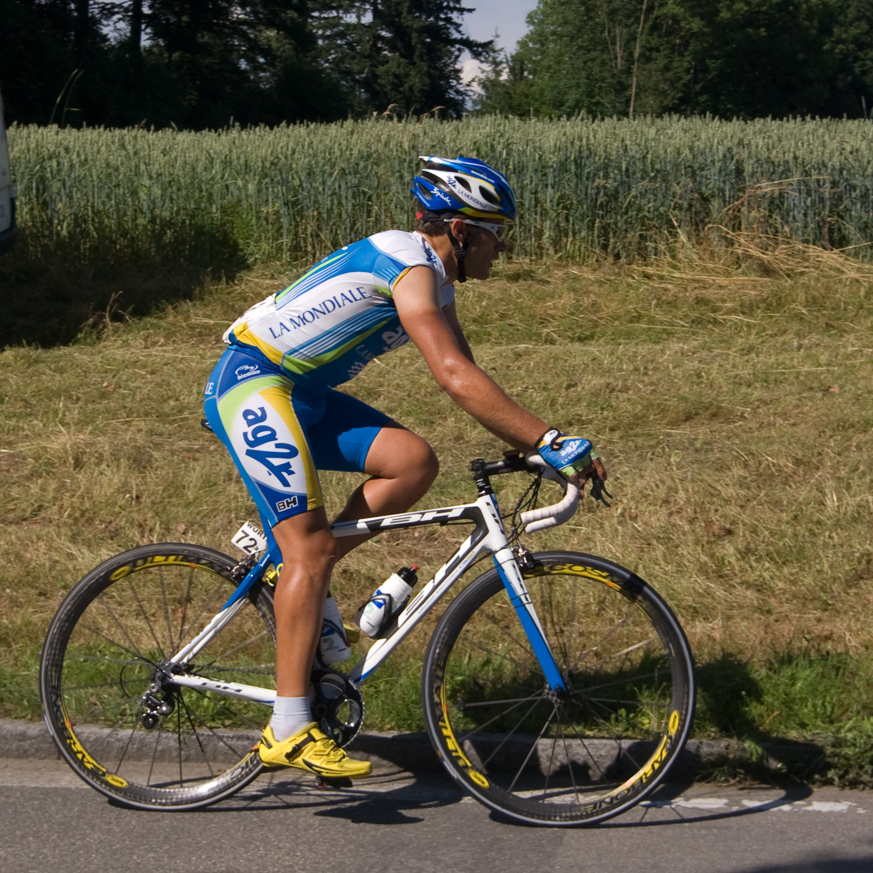 Tour de Suisse 2008.